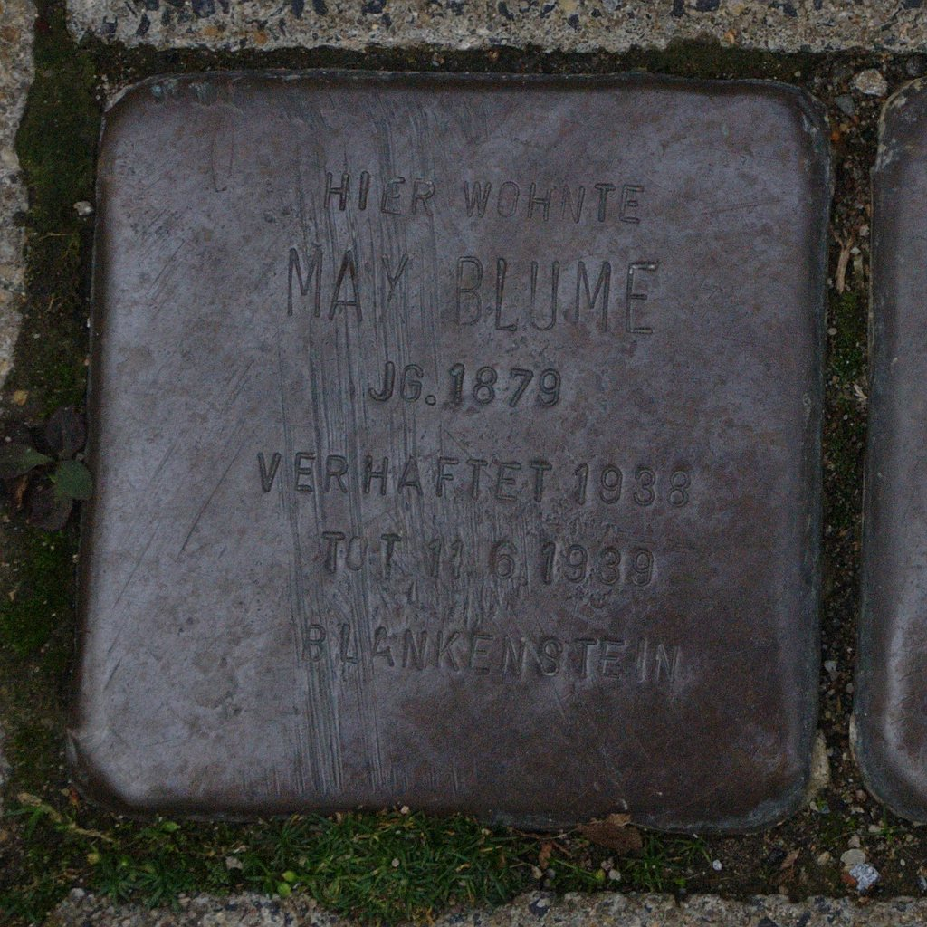 Stolperstein in Hattingen Max Blume